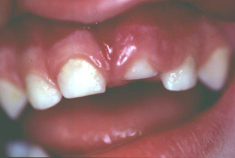 intrusion dent temporaire